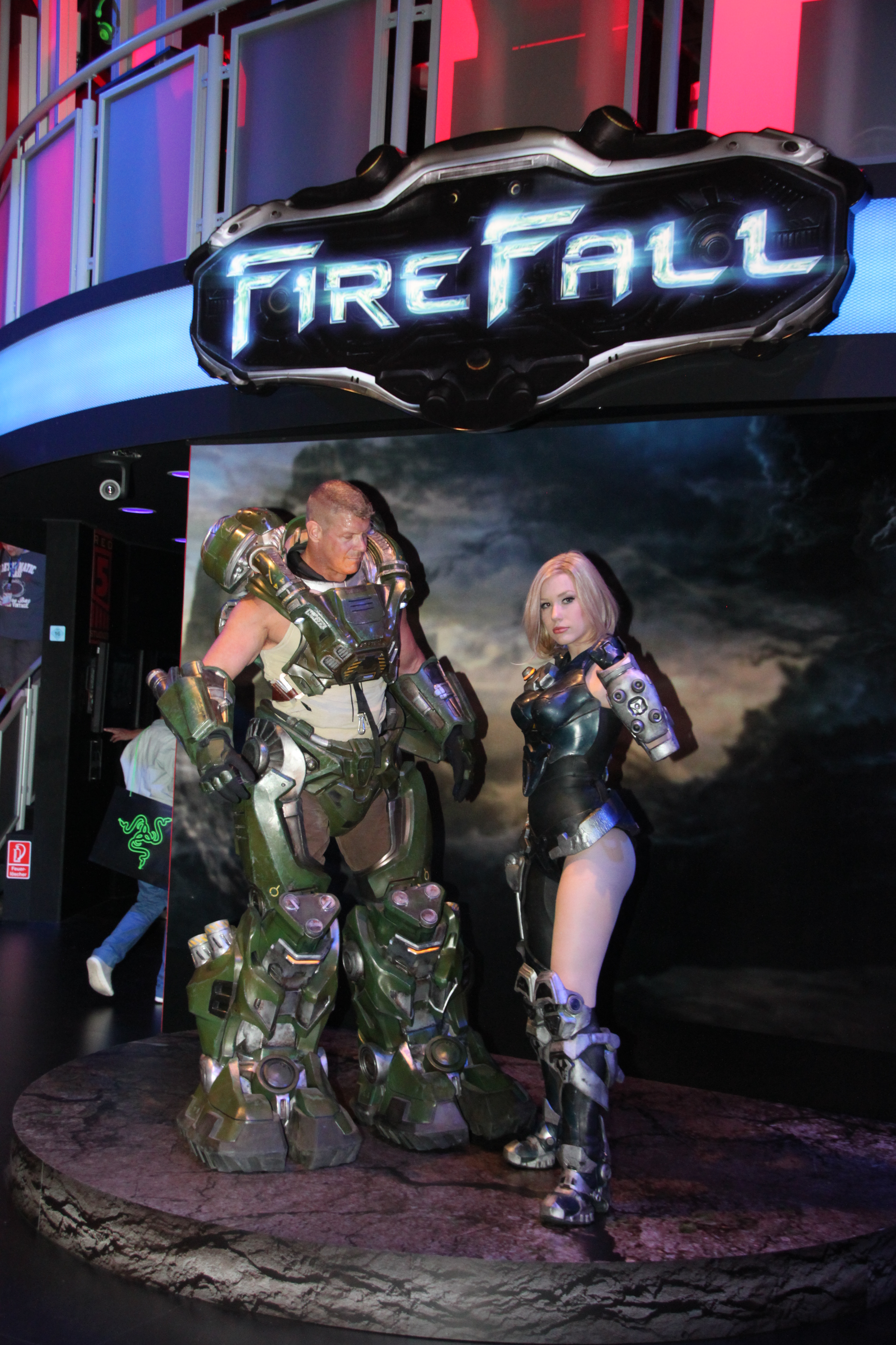 Firefall 3/5